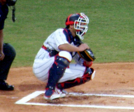 阿部慎之助